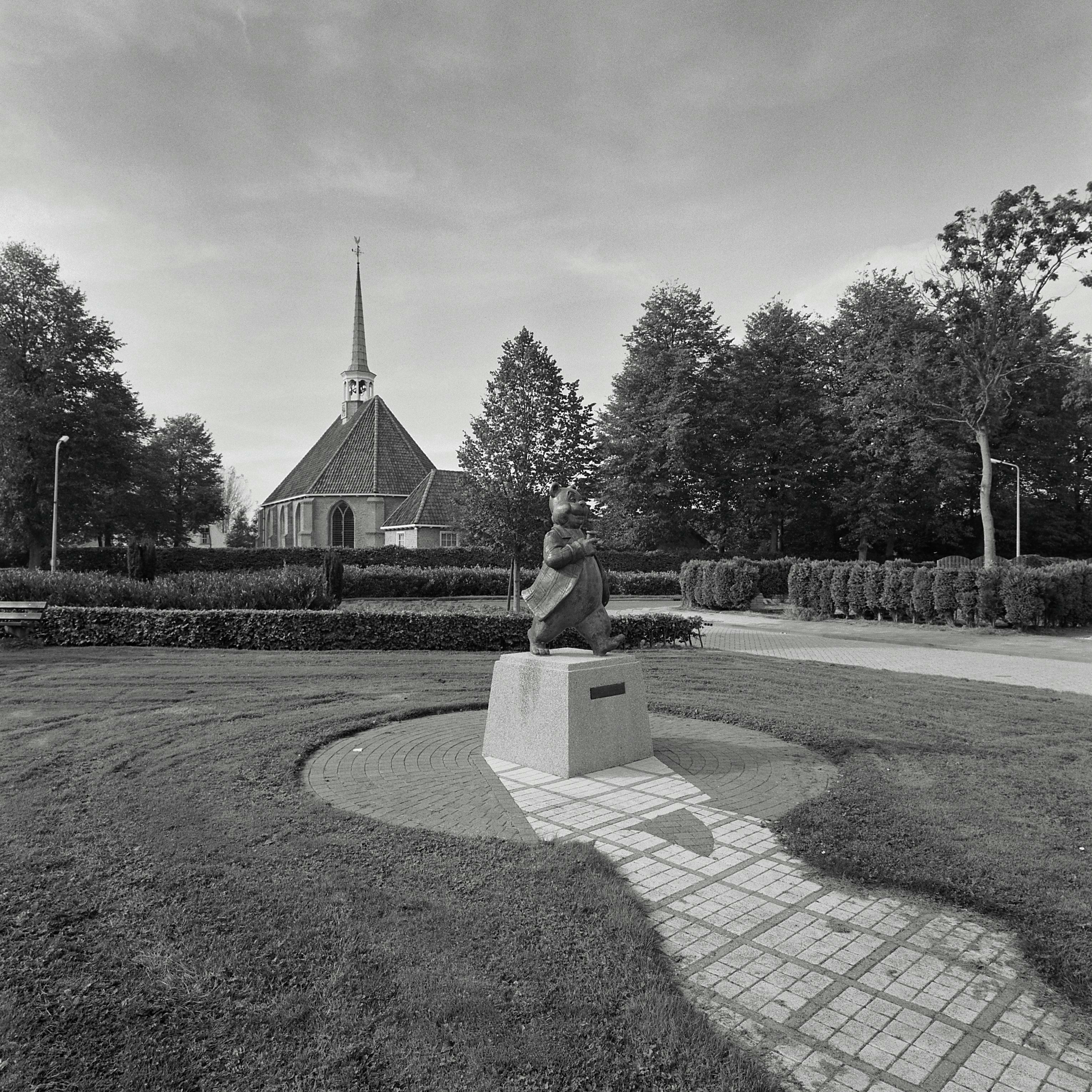 Nederlands Hervormde Kerk: Overzicht kerk met op de voorgrond beeld van Olivier B. Bommel (opmerking: Gefotografeerd voor Monumenten In Nederland Zuid-Holland)